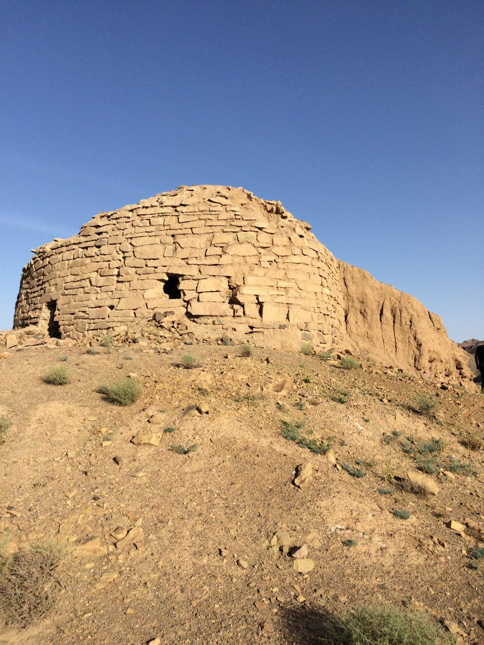 قلعه زاربلاغ متعلق به دوره مادی